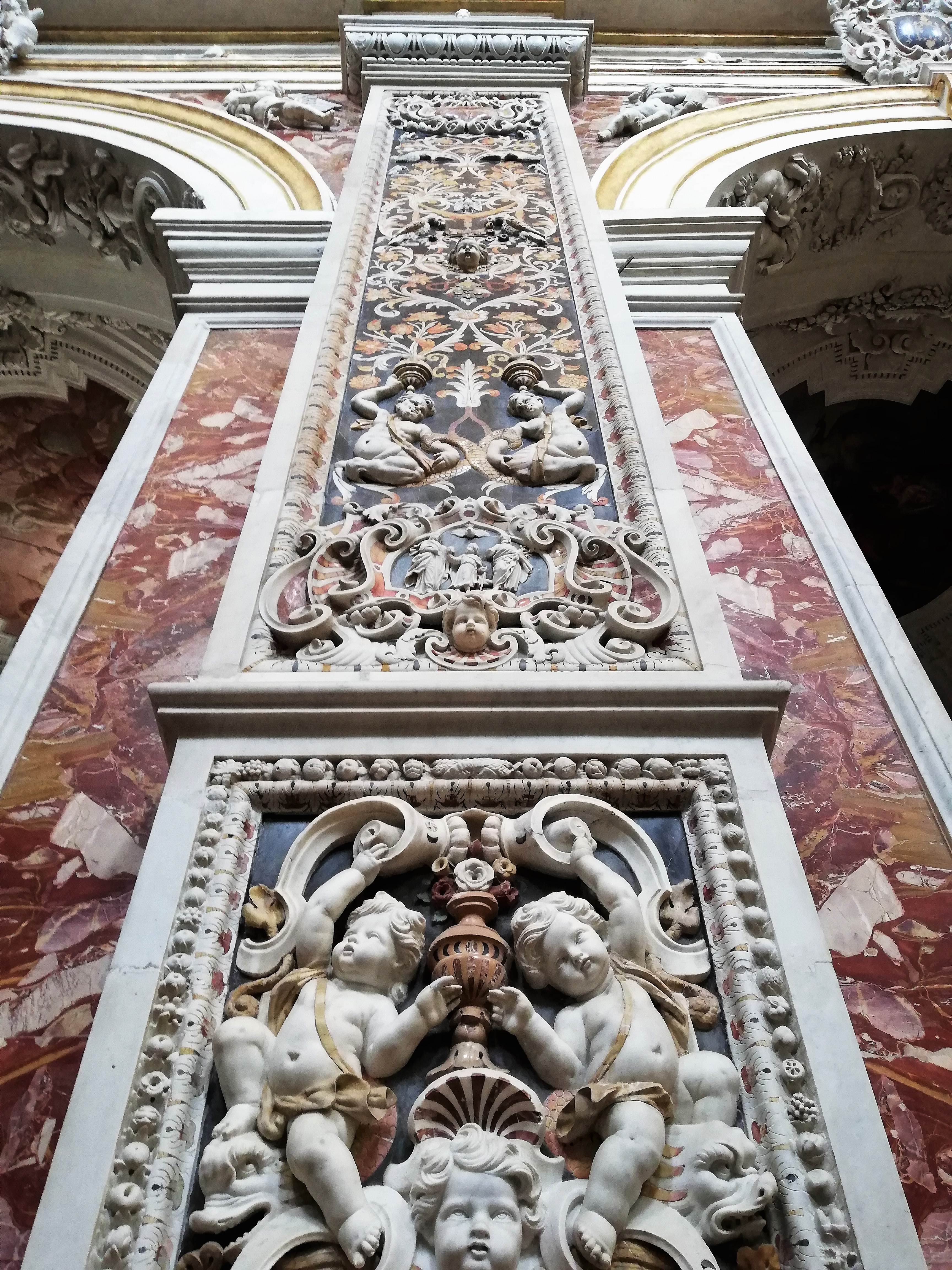 Marmi mischi.